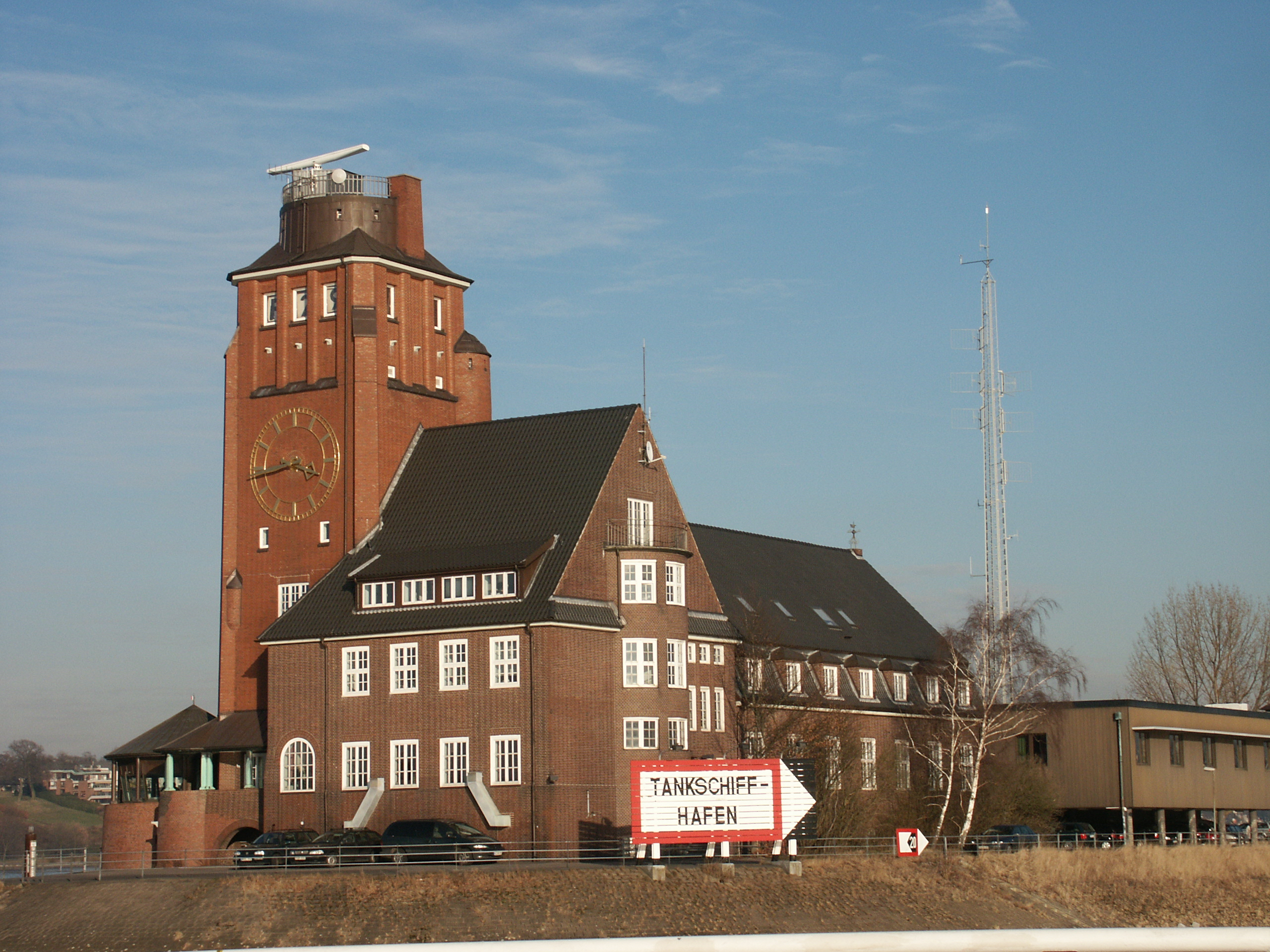 Lotsenhaus Seemannshöft in Hamburg-Waltershof